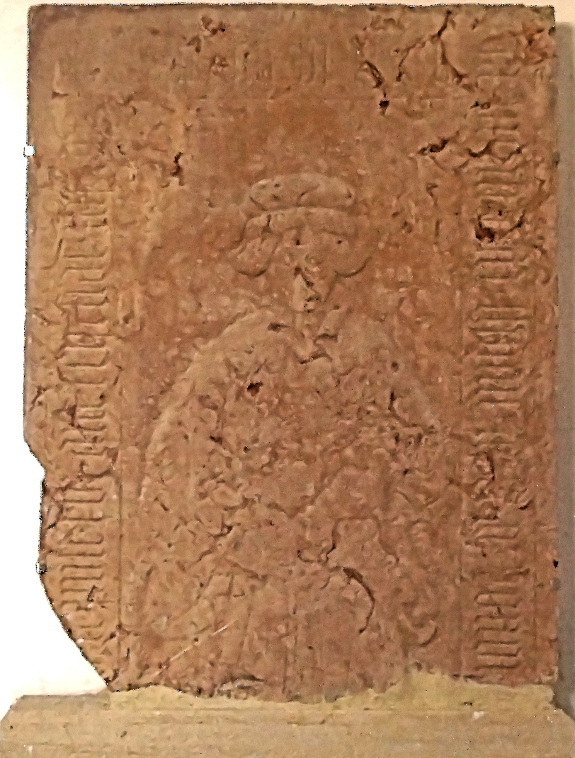 Marmorgrabstein des Pfarrers Hans Hippelsdorfer. Der Stein zeigt den Pfarrer als Domherrn mit dem Barett auf dem Kopf. Die Umschrift (in gotischen Minuskeln) lautet: Im Jahr des Herrn 1405 am Tag des Apostels Thomas (21.12.) starb der ehren... (ergänzt: ...werte Herr Dechant und Pfarrer Hans der Hippelsdorfer. Er wurde hier...) ...begraben, seine Seele ruhe in Frieden. 1413 stiftete sein Neffe Ulrich der Hippelsdorfer, Pfarrer in Ravelsbach, ihm in unserer Kirche einen Altar und einen Jahrtag. (übersetzt und teilweise ergänzt von Prof. Dr. Hans Rupprich, Wien 1934)